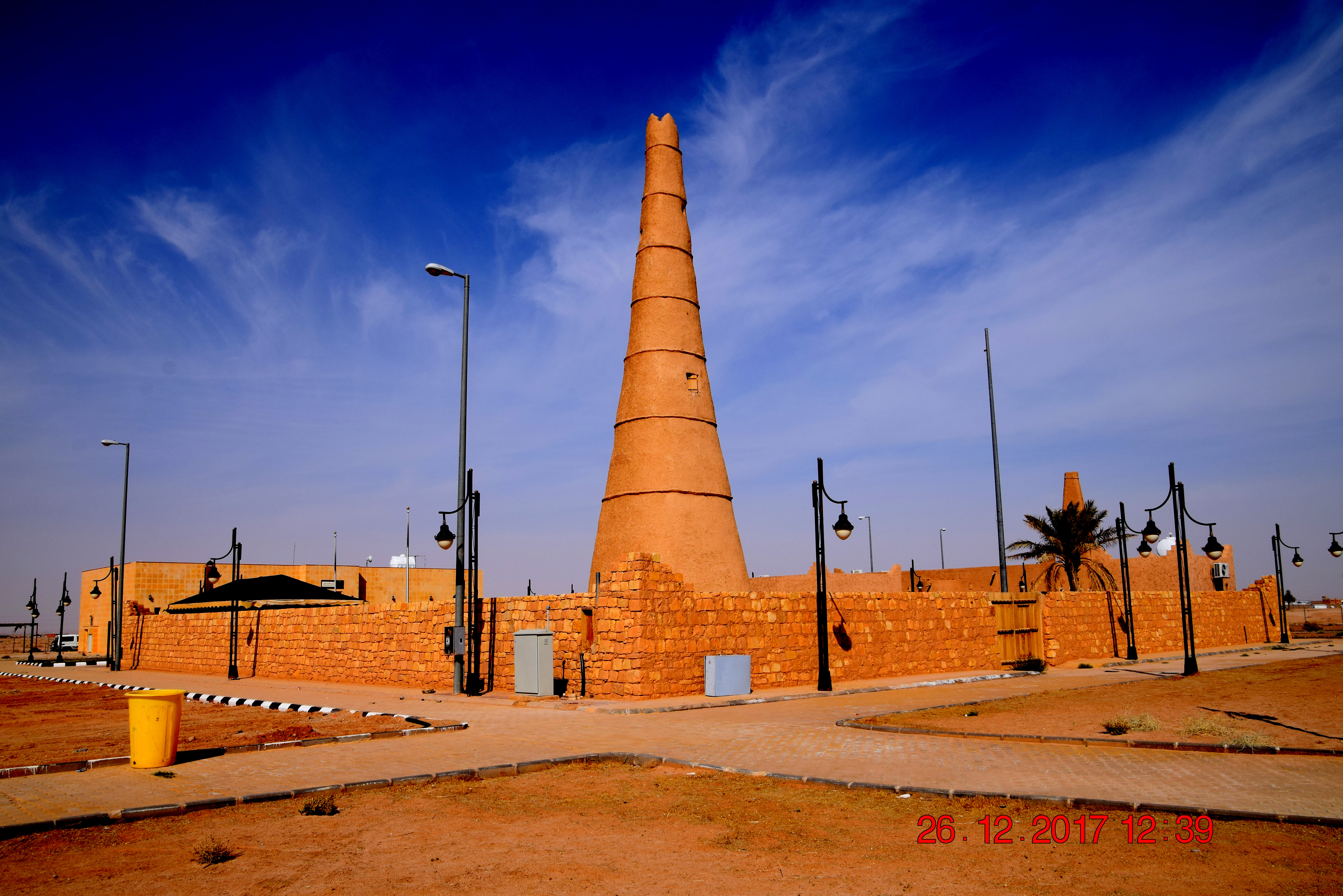 برج الشنانة، أو مرقب الشنانة هو معلم أثري يقع في الشنانة بـمنطقة القصيم، المملكة العربية السعودية ويبعد عن محافظة الرس حوالي 7 كم تقريباً من الجهة الجنوبية الغربية